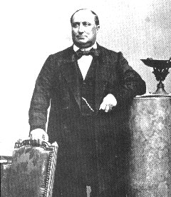 Antoine Bonaparte